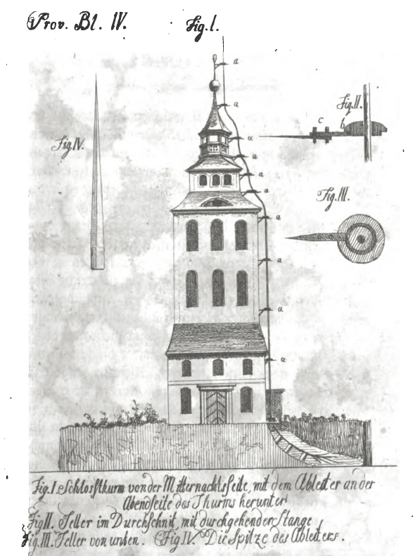 Zeichnung eines Blitzableiters welcher im Oktober 1781 an den Turm des Schlosses Hainewalde angebracht wurde